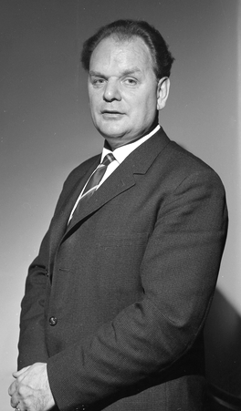 portrett, mann, operasanger, kordirigent, stående halvfigur. Rigmor Dahl Delphin (1908-1993) var ansatt som fotograf i ukebladet Alle Kvinner. Hennes negativarkiv ble i 2005 overført Oslo Bymuseum fra Gyldendal Norsk Forlag som var utgiver av bladet.